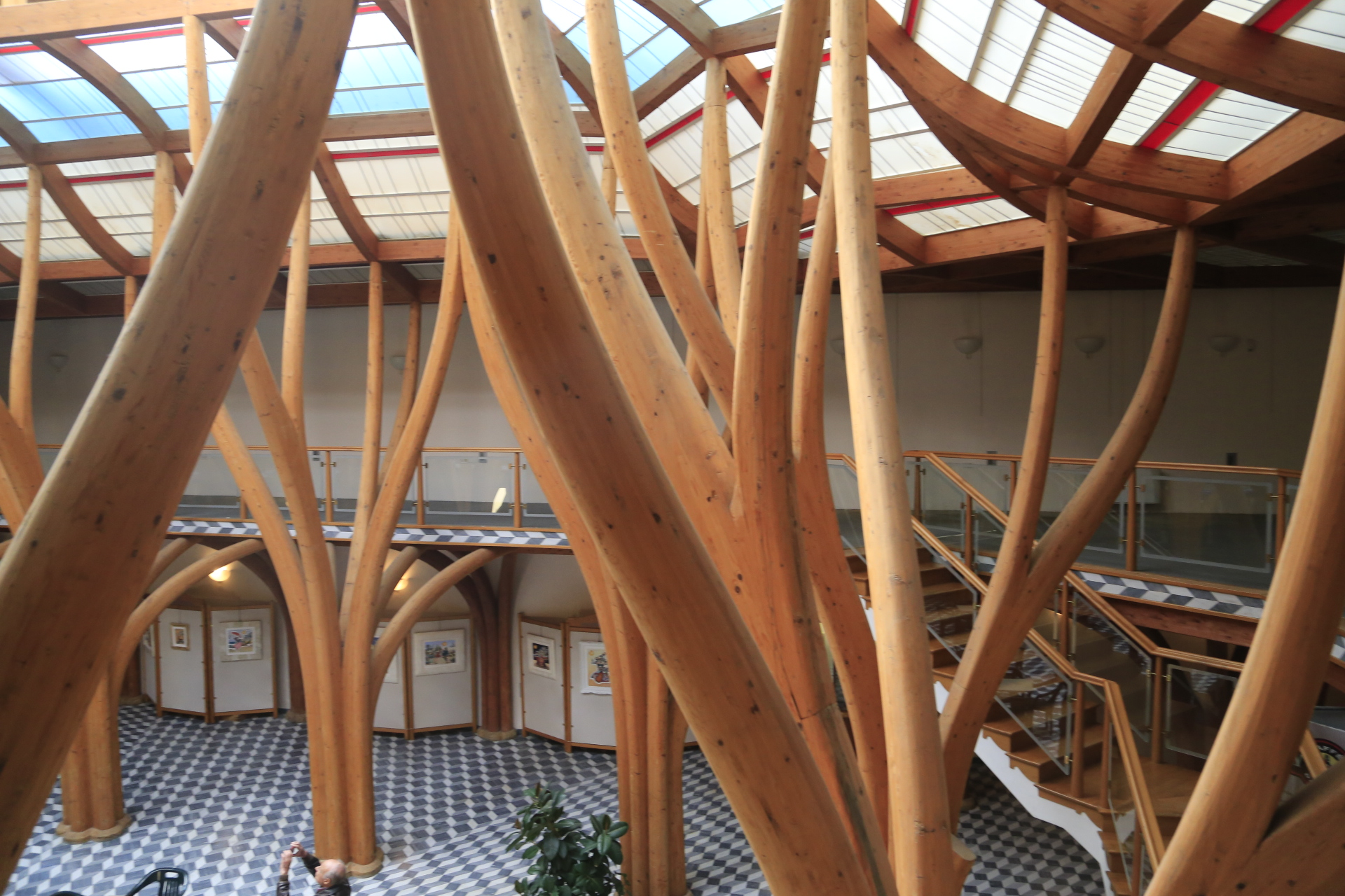 Salone Portoghesi